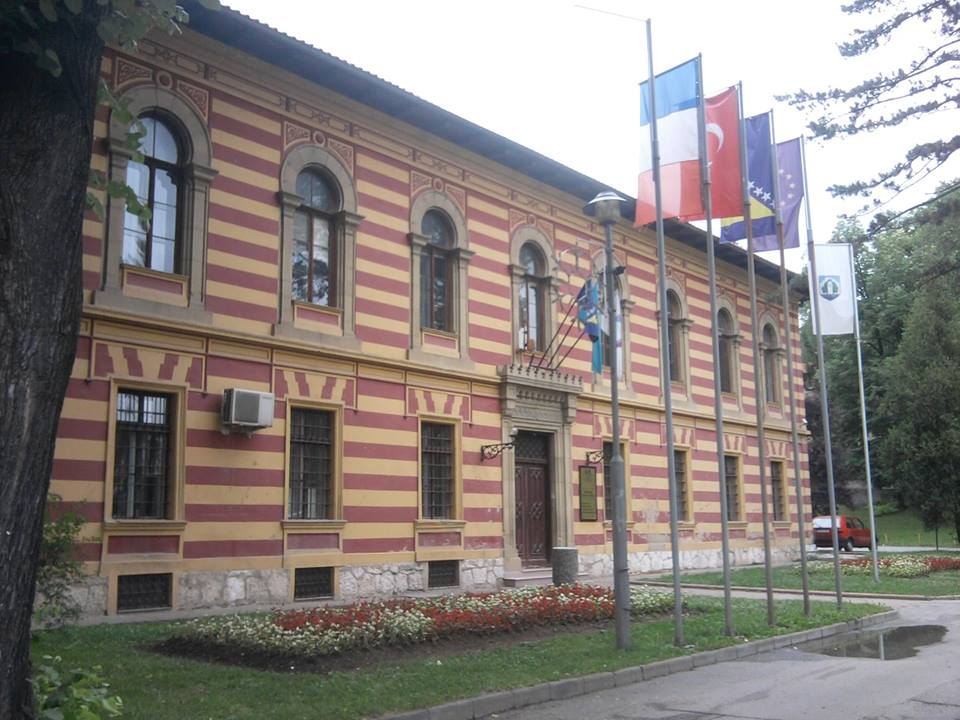 Občinska stavba v Gračanici.